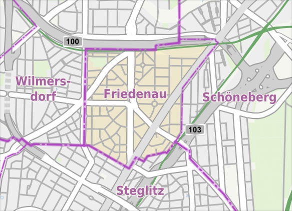 Übersichtskarte der Straßen und Ortslagen in Berlin-Friedenau